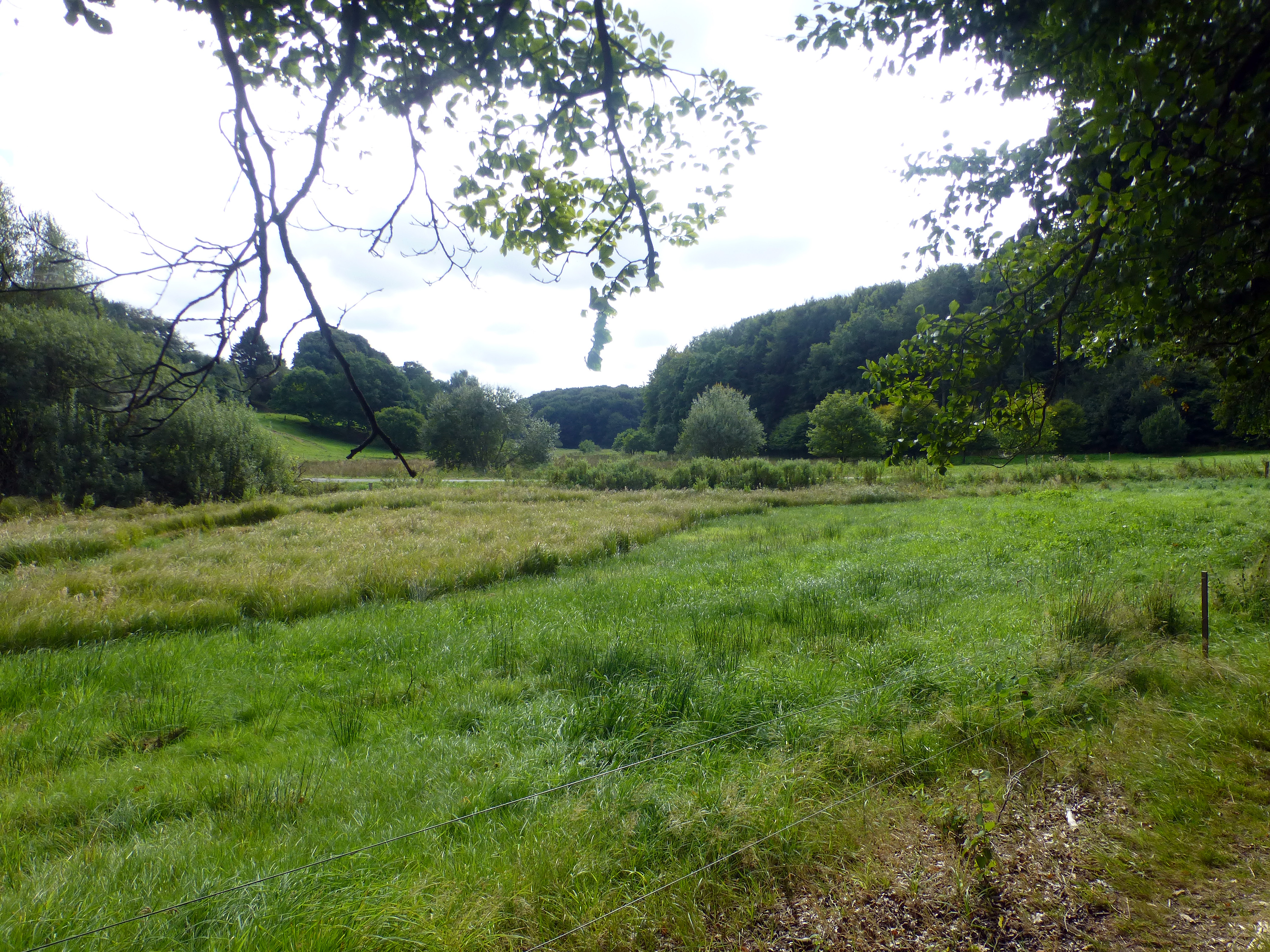 Jeksendalen set mod sydøst